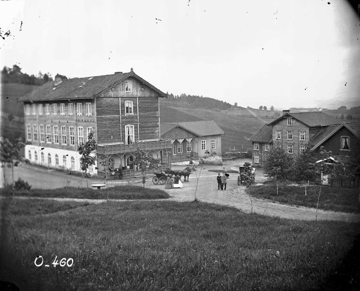 Grefsen sanatorium, veranda, gårdsplass, hestekjøretøy, mennesker, kulturlandskap.